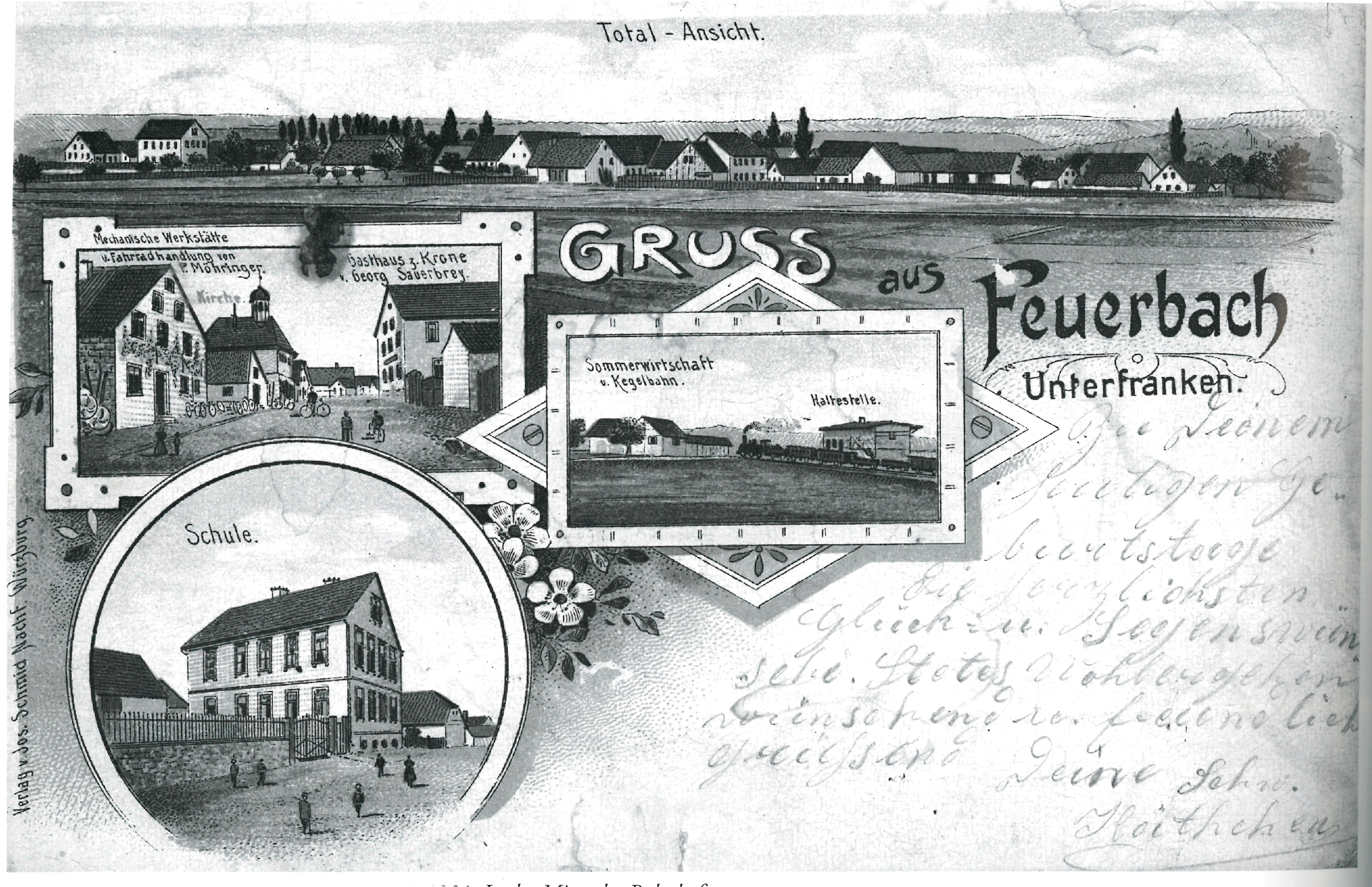 Postkarte von Wiesentheid-Feuerbach. 1901. Zentral ist die Haltestelle der Eisenbahn.